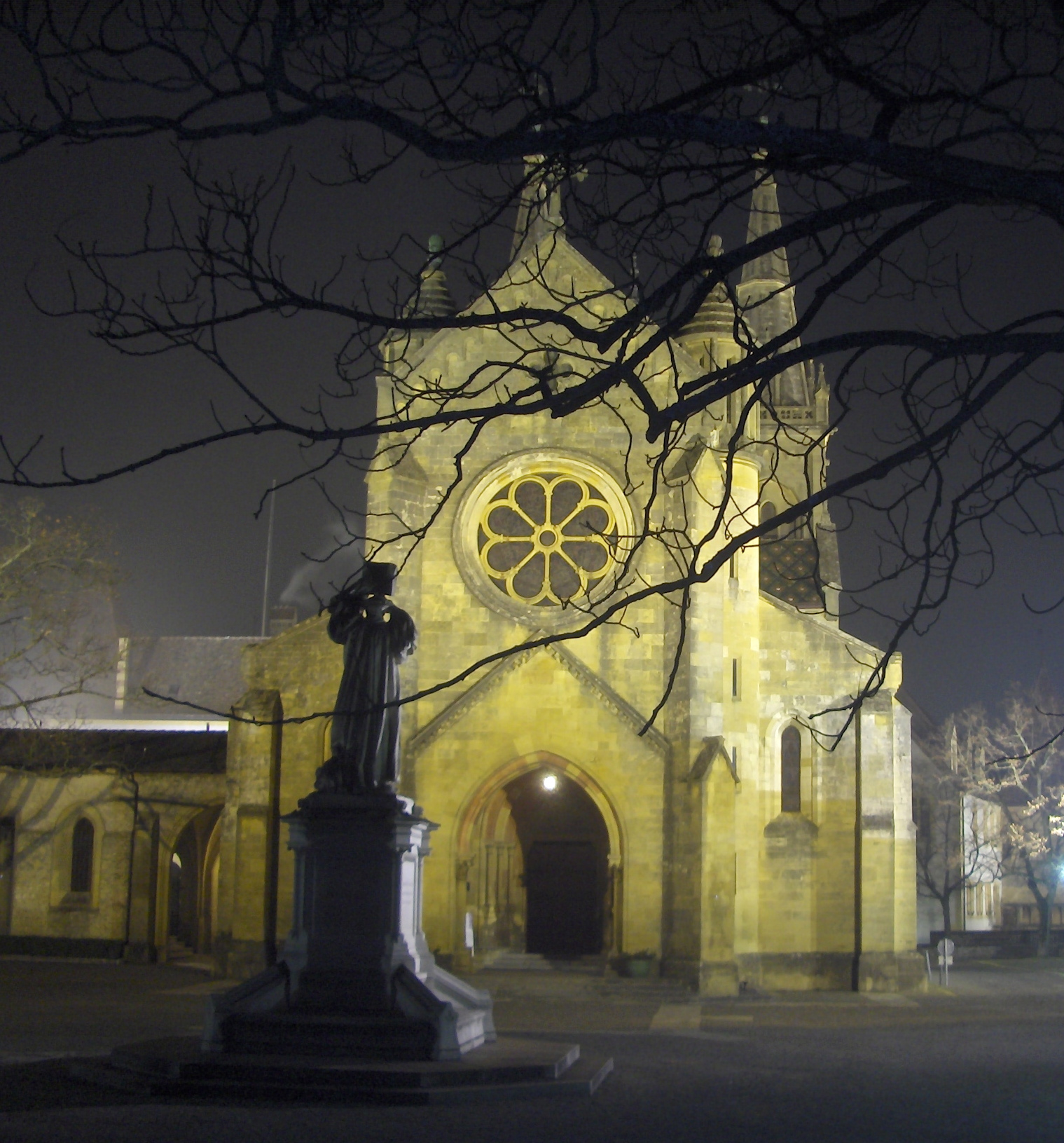 Auteur : Calendula